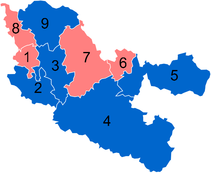 Résultats des élections législatives de la Moselle en 2012